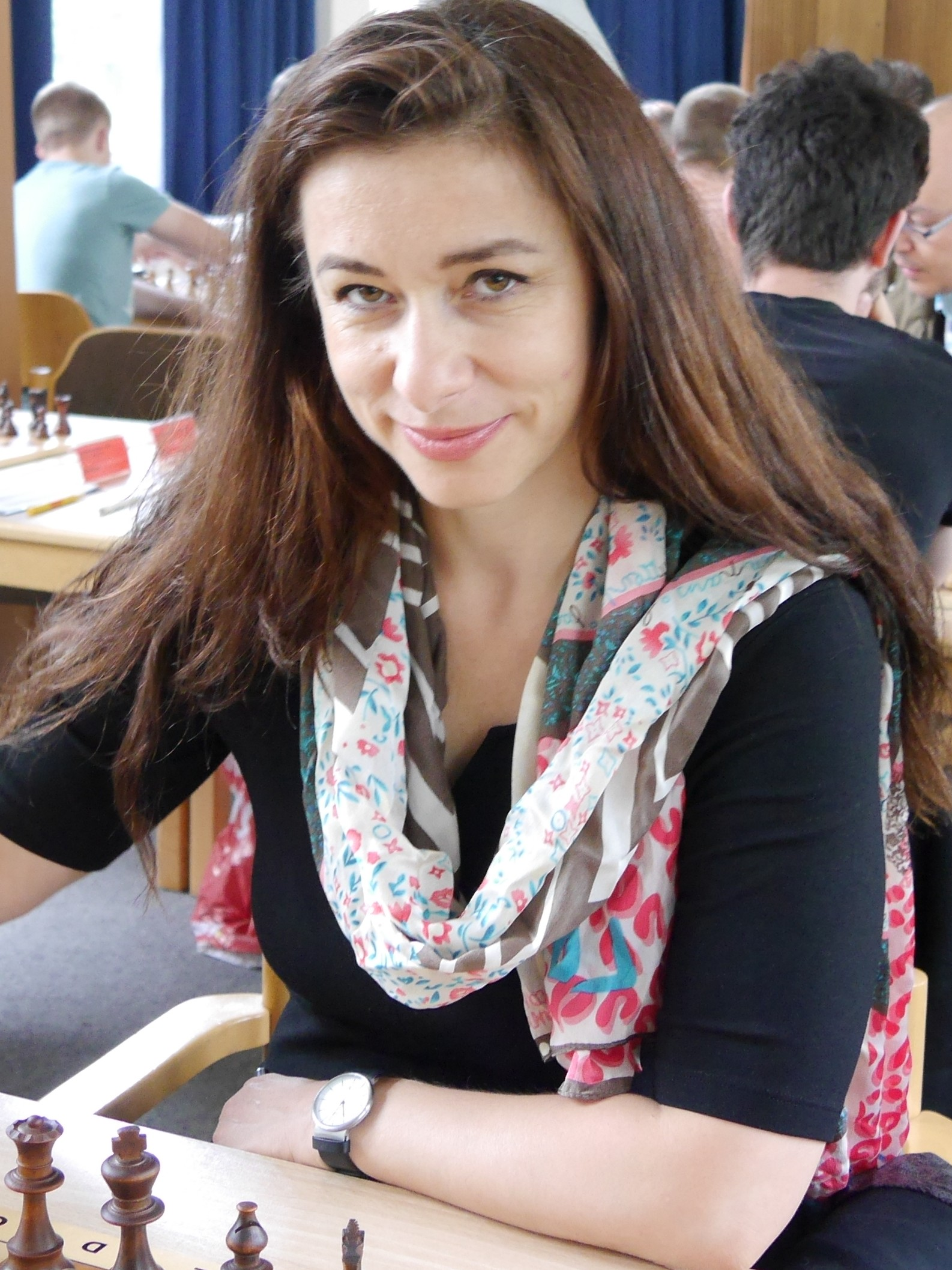 Mara Jelica, Dortmunder Schachtage 2016, Open A.